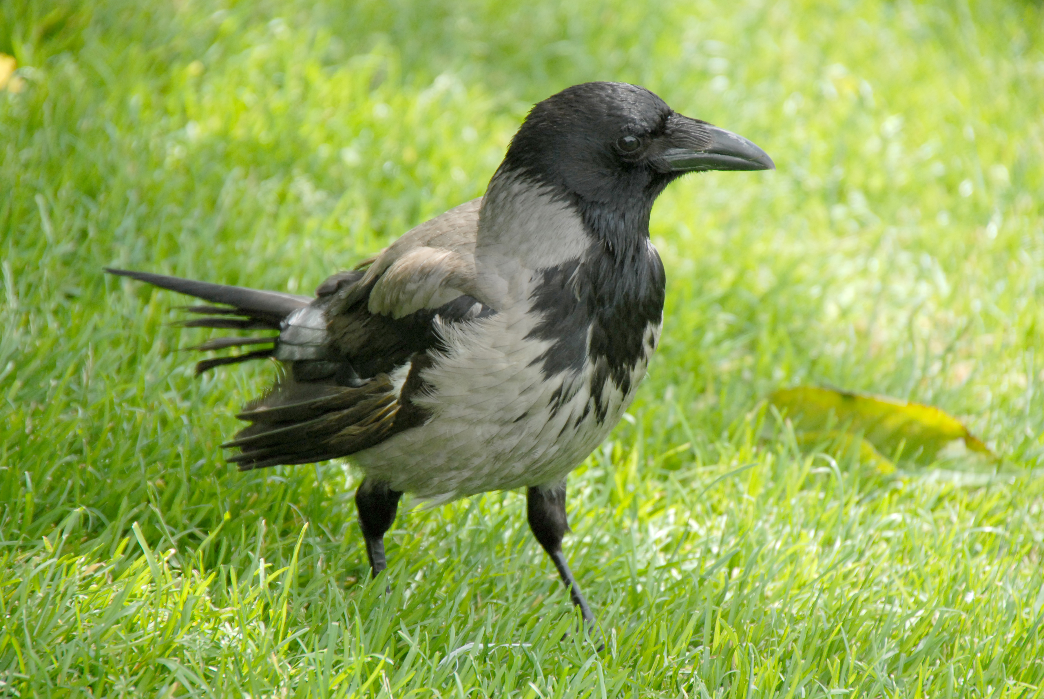 Corneille mantelée au lac de Bergen, Norvège.